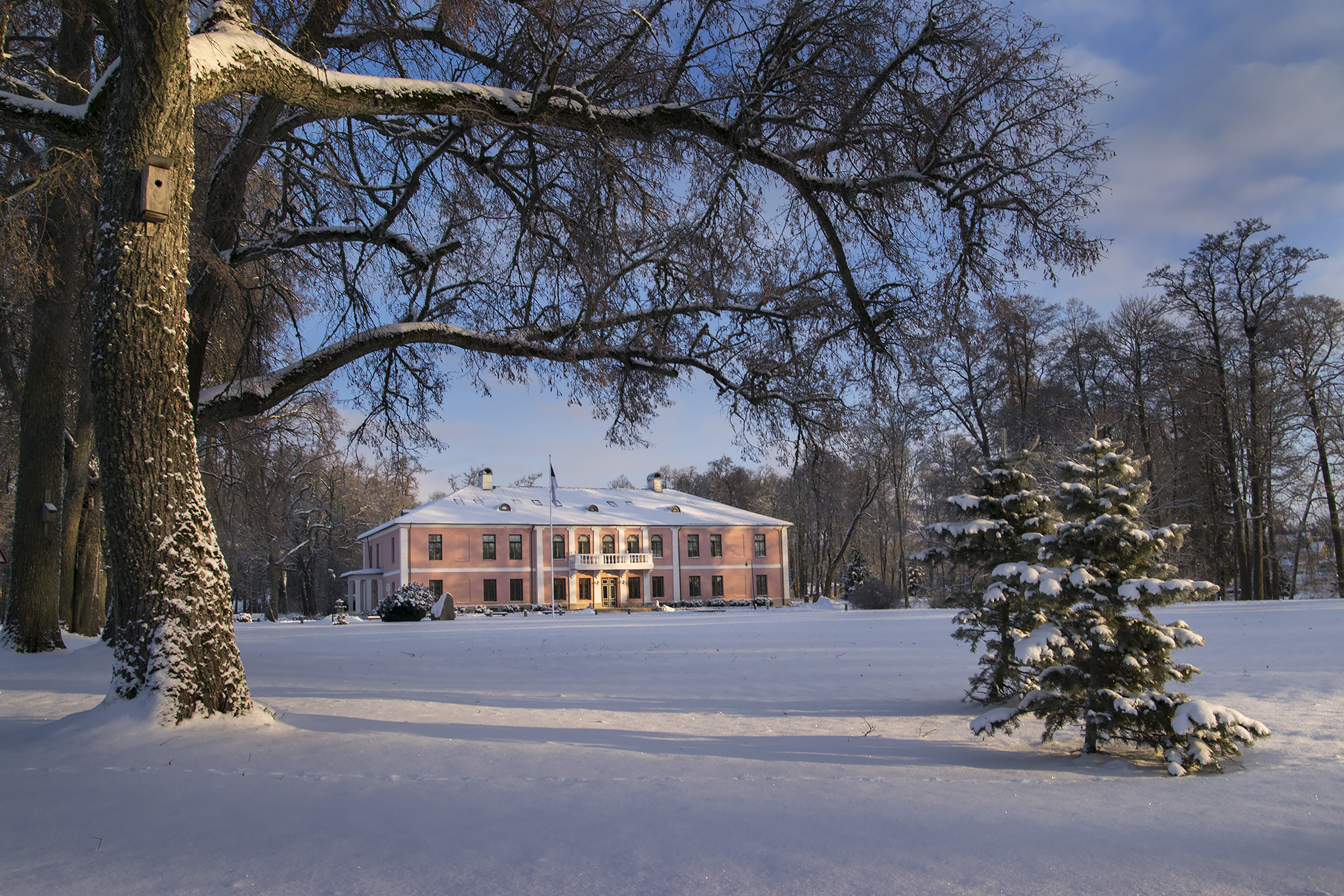 Tõstamaa mõisahoone